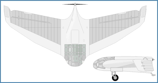 DFS 40